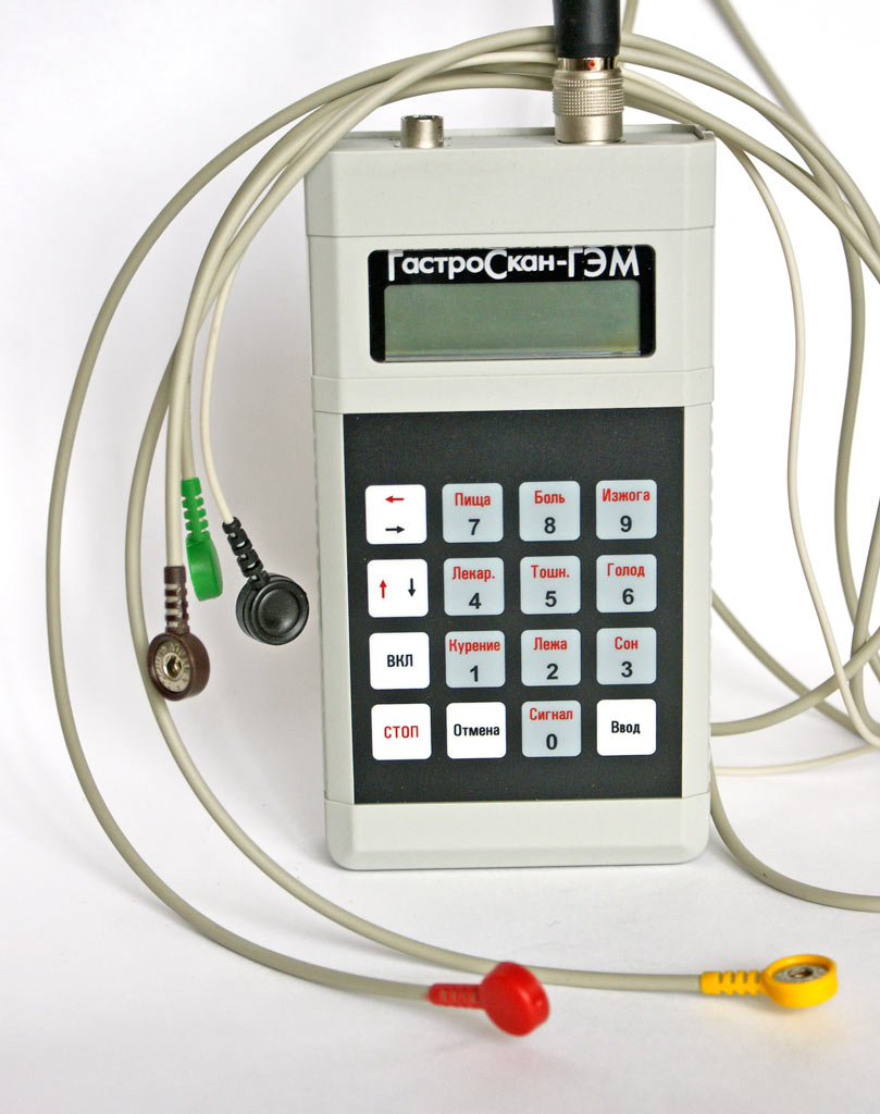 Гастроэнтеромонитор "Гастроскан-ГЭМ" с двумя электрогастроэнтерографическими и одним рН-метрическим каналами